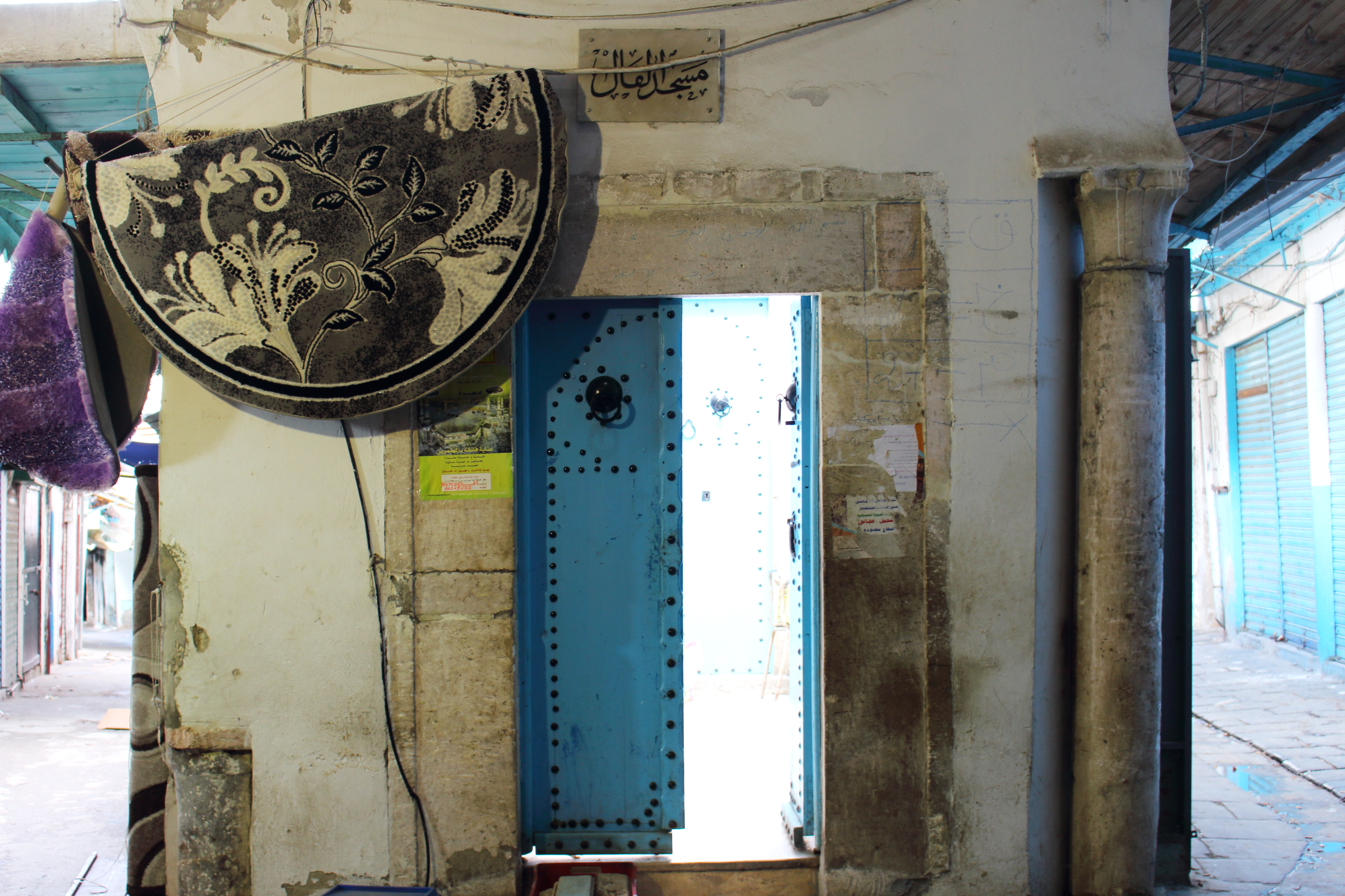 Mesjed El Fell